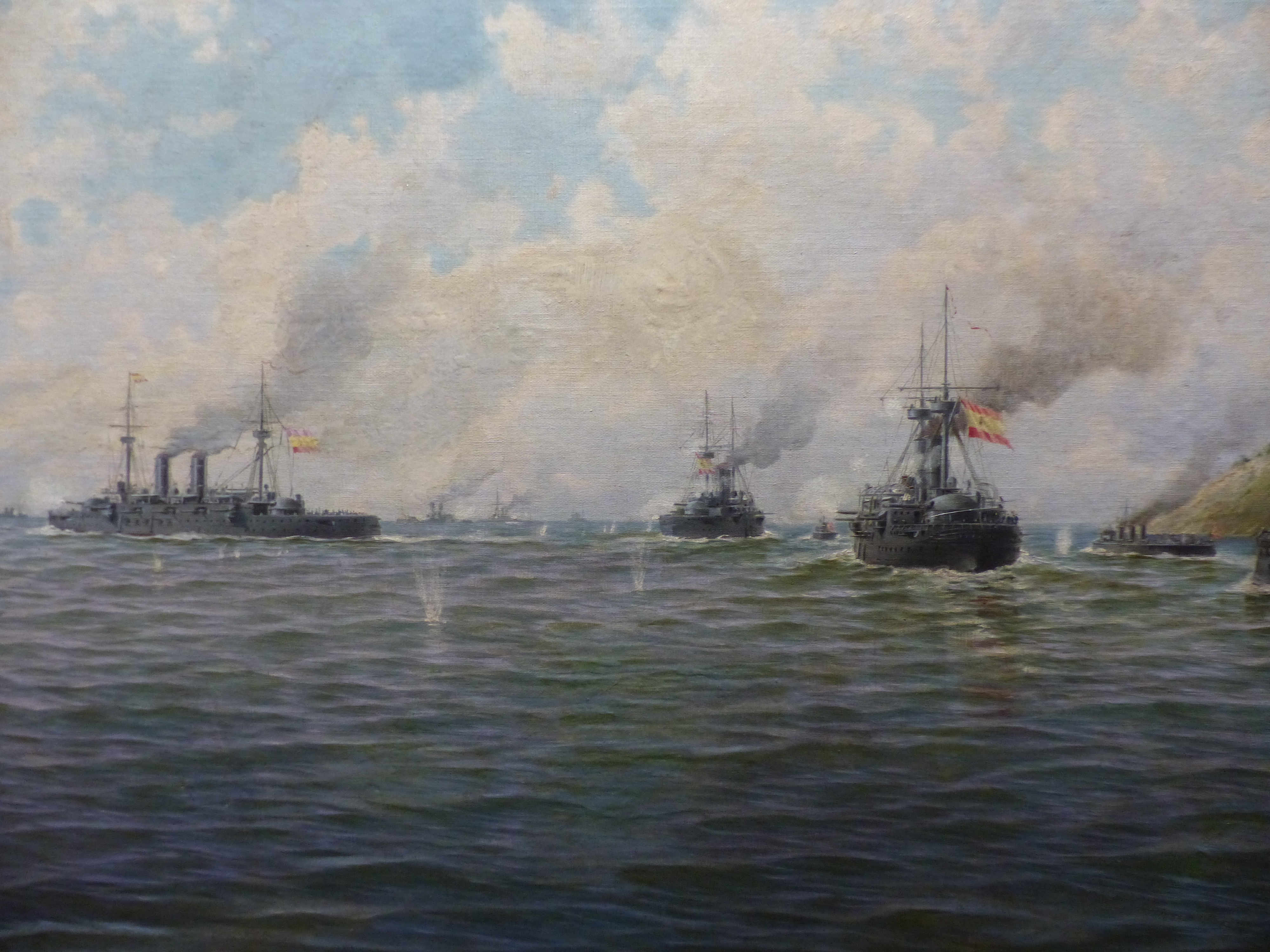 Ildefonso Sanz Doménech (1863-1937)